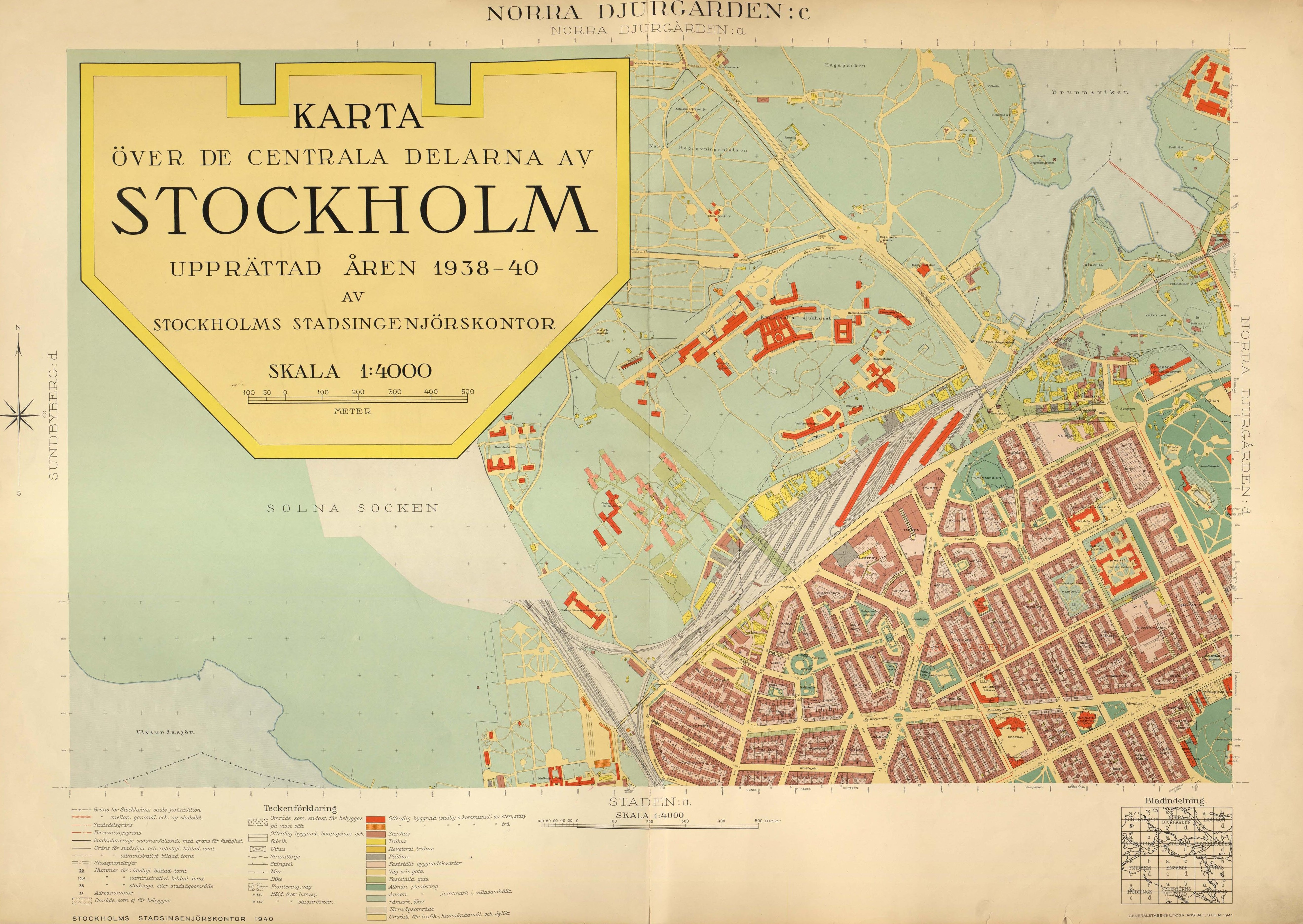 1940 års karta över Stockholm, delblad "Norra Djurgården"